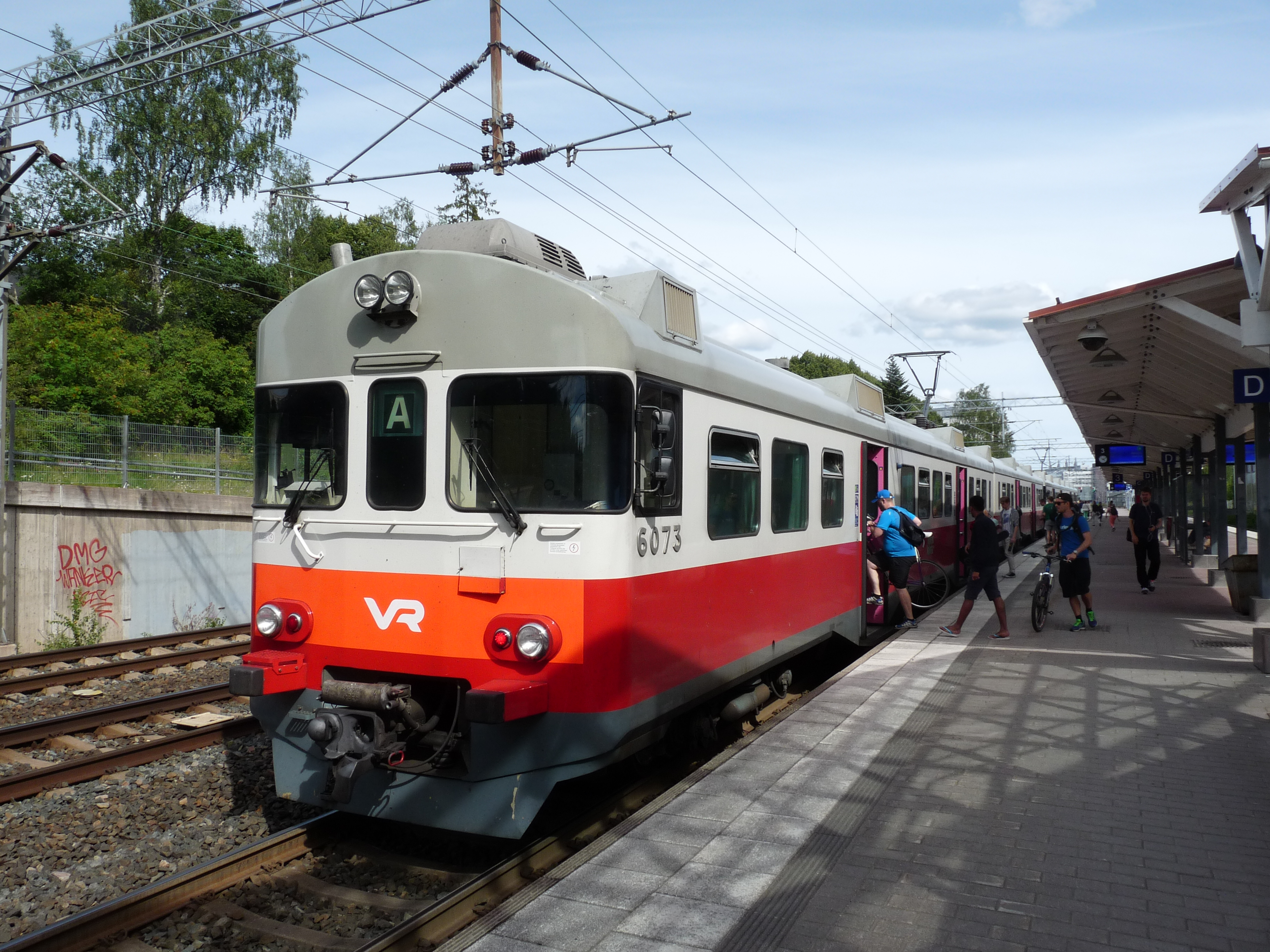 Voorstadstreinen in Pitäjänmäki station